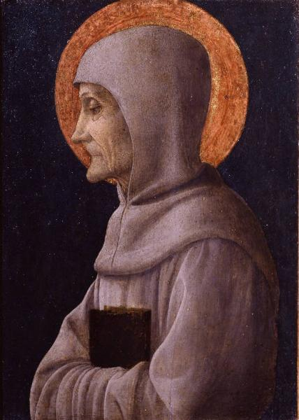 Andrea Mantegna (già attribuito a Dario da Pordenone e alla bottega dello Squarcione): San Bernardino da Siena tempera su tavola - 21,2 cm x 29,5 cm eseguito tra il 1444 - 1446 Accademia Carrara - Bergamo